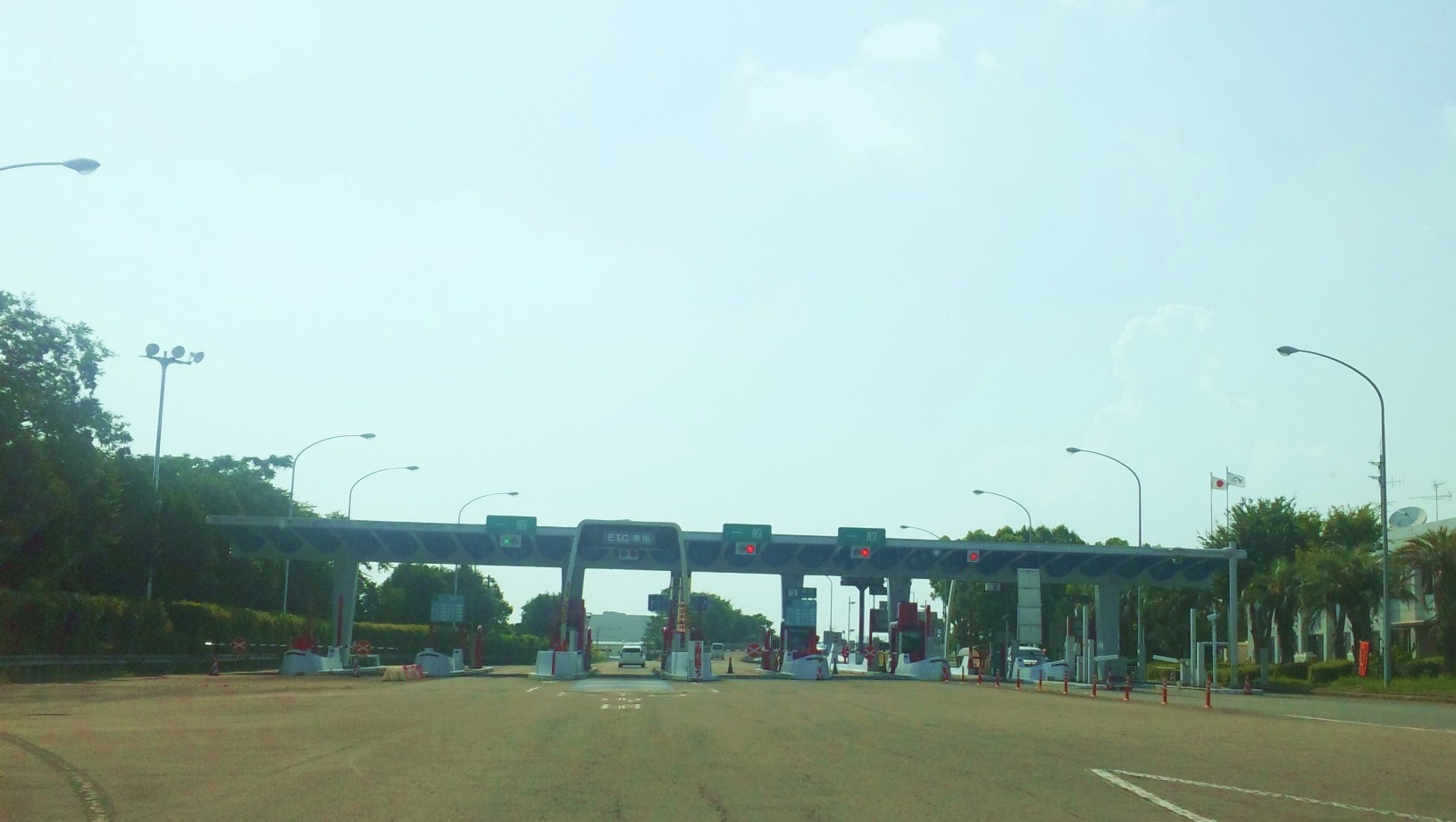 都城ICの画像